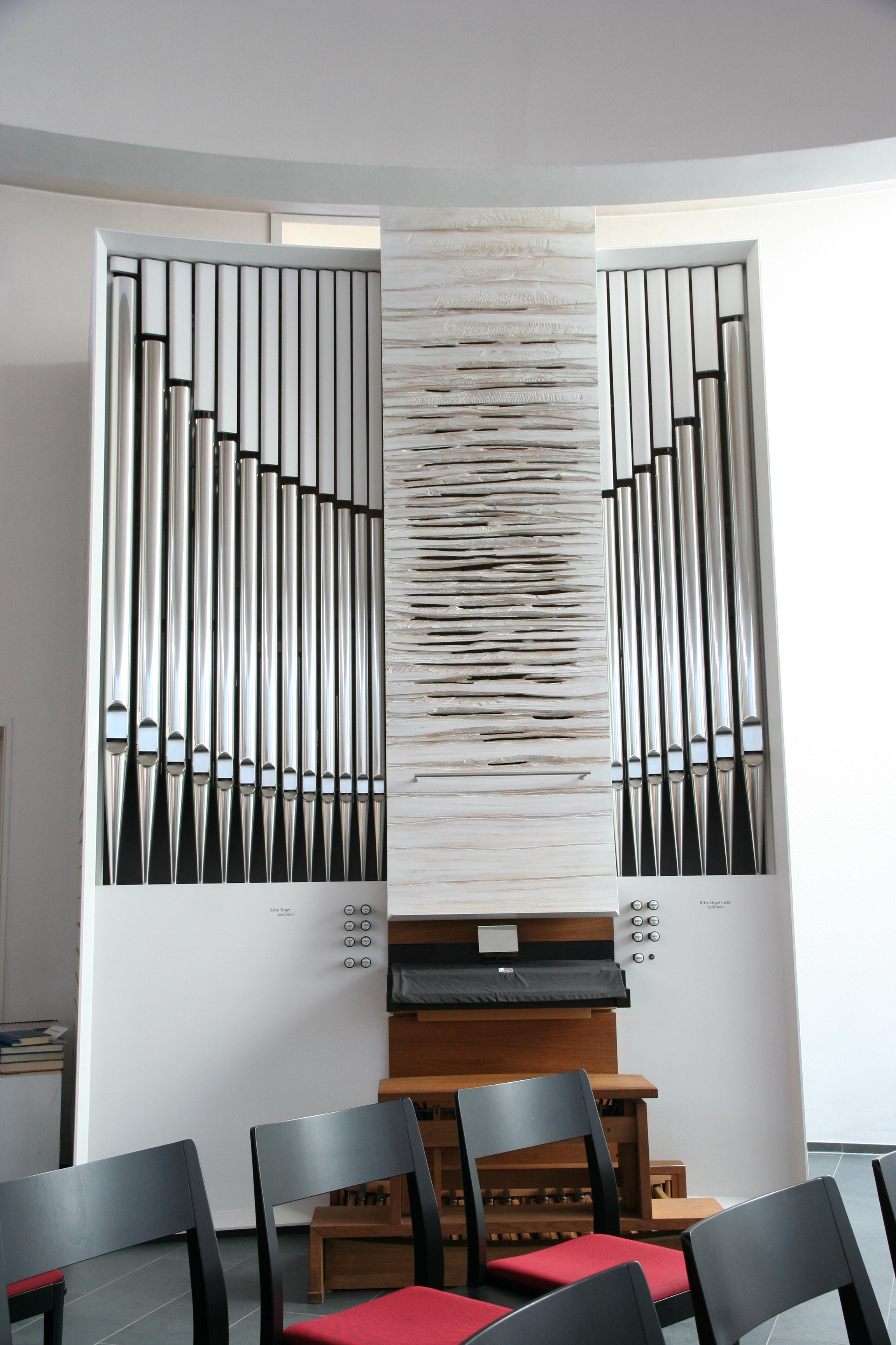 Römisch-katholische Kirche St. Leonhard Feuerthalen, Orgel